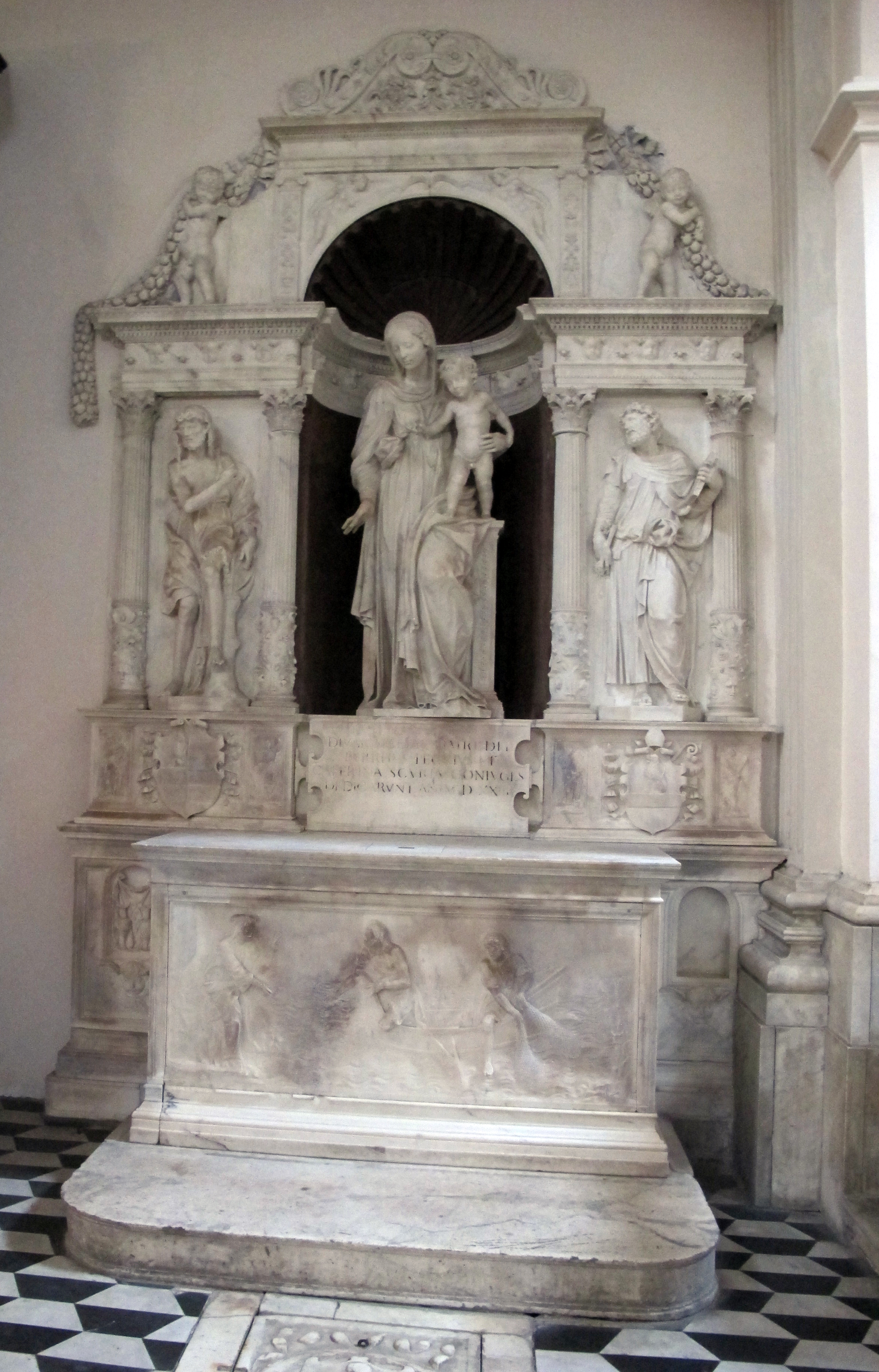 Sant'Anna dei Lombardi (Napoli)